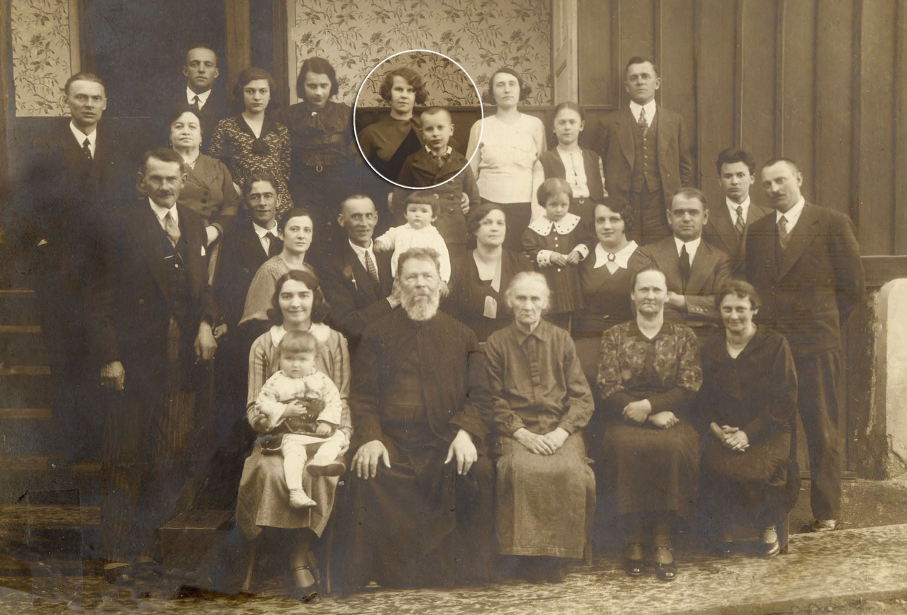 Imagine de Victor Sahleanu cu mama sa Victoria, la o reuniune de familie în 1935